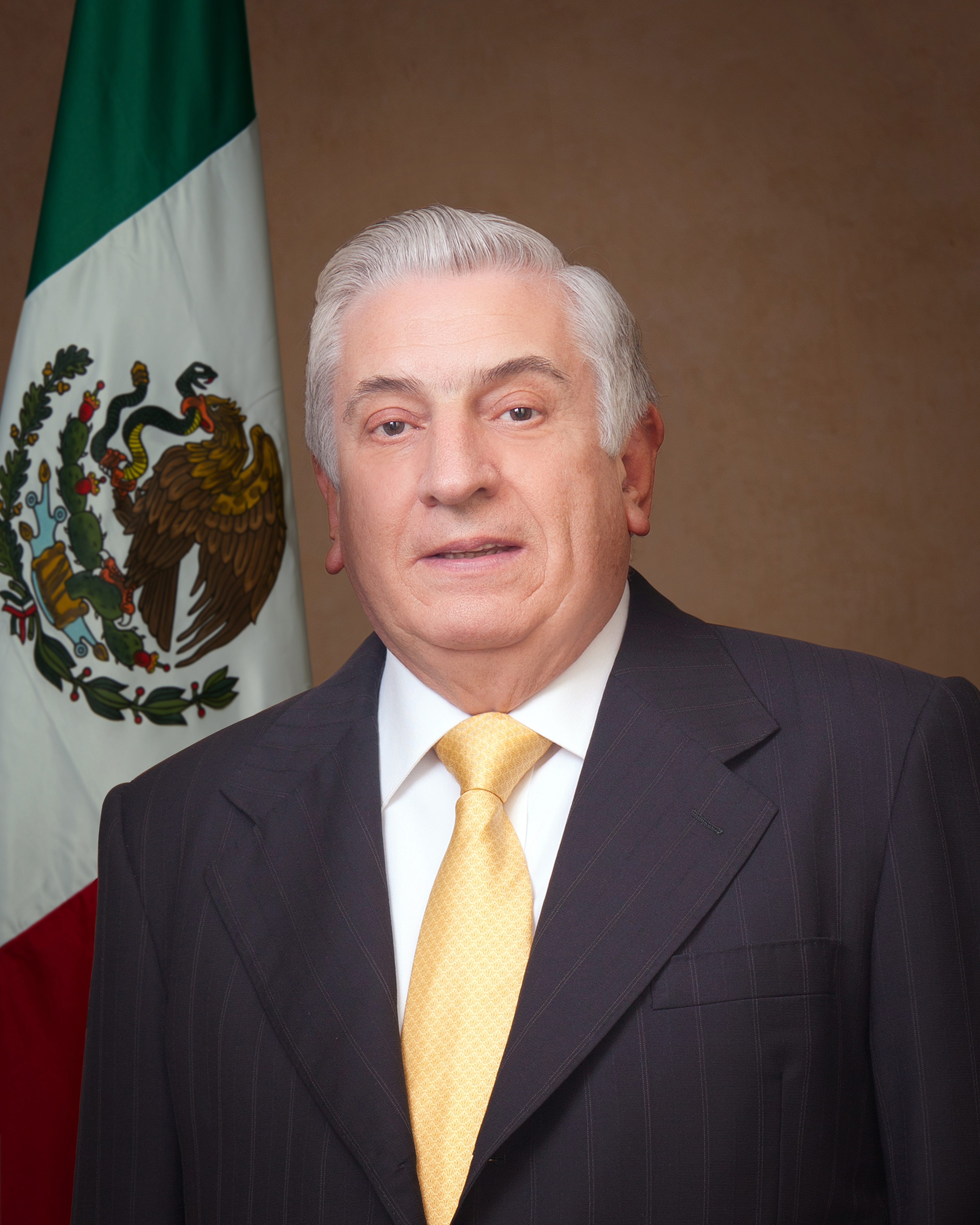 Foto Oficial del Gobernador del Estado de Tabasco, Lic. Arturo Núñez Jiménez